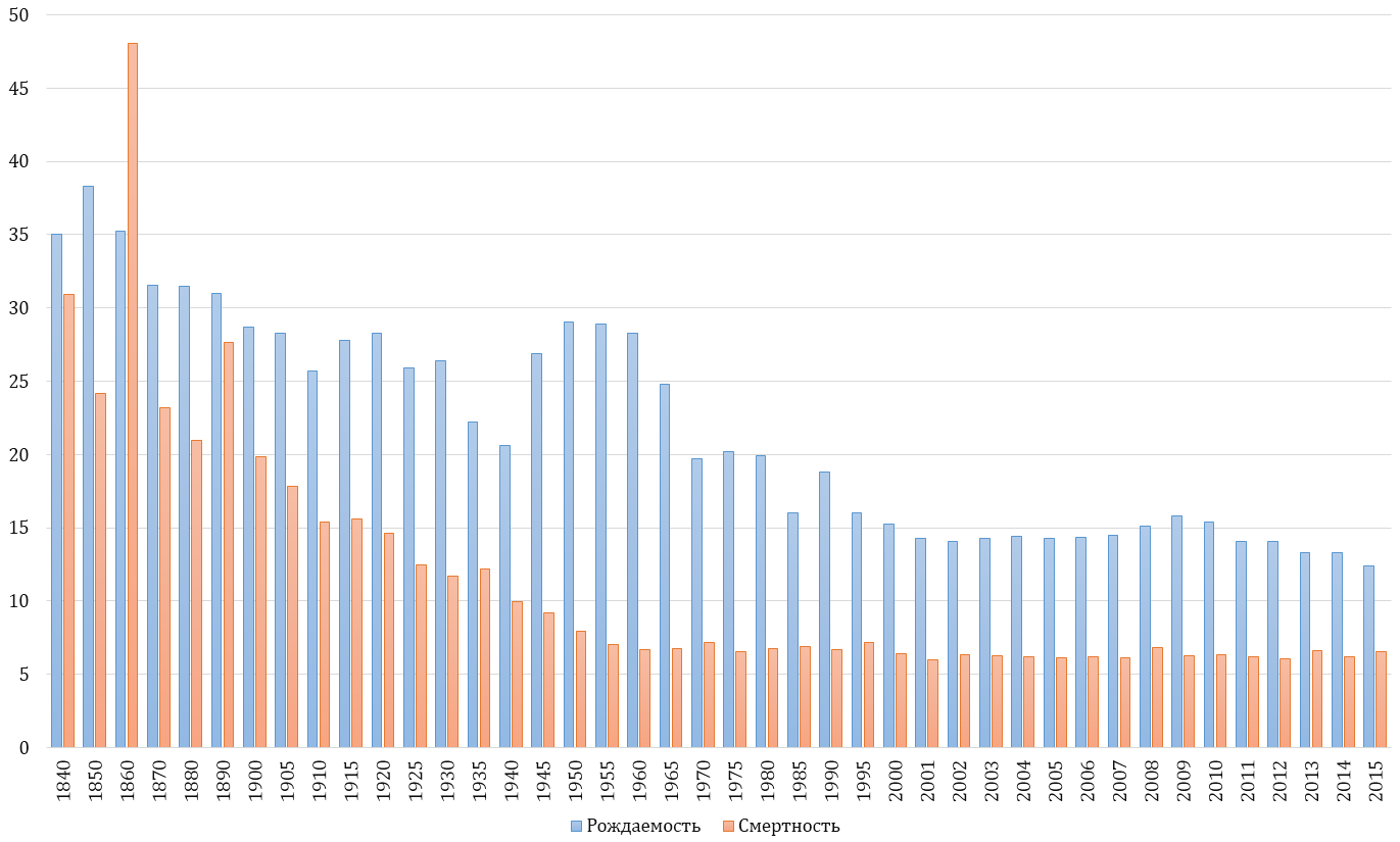 Естественное движение Исландии 1840-2015